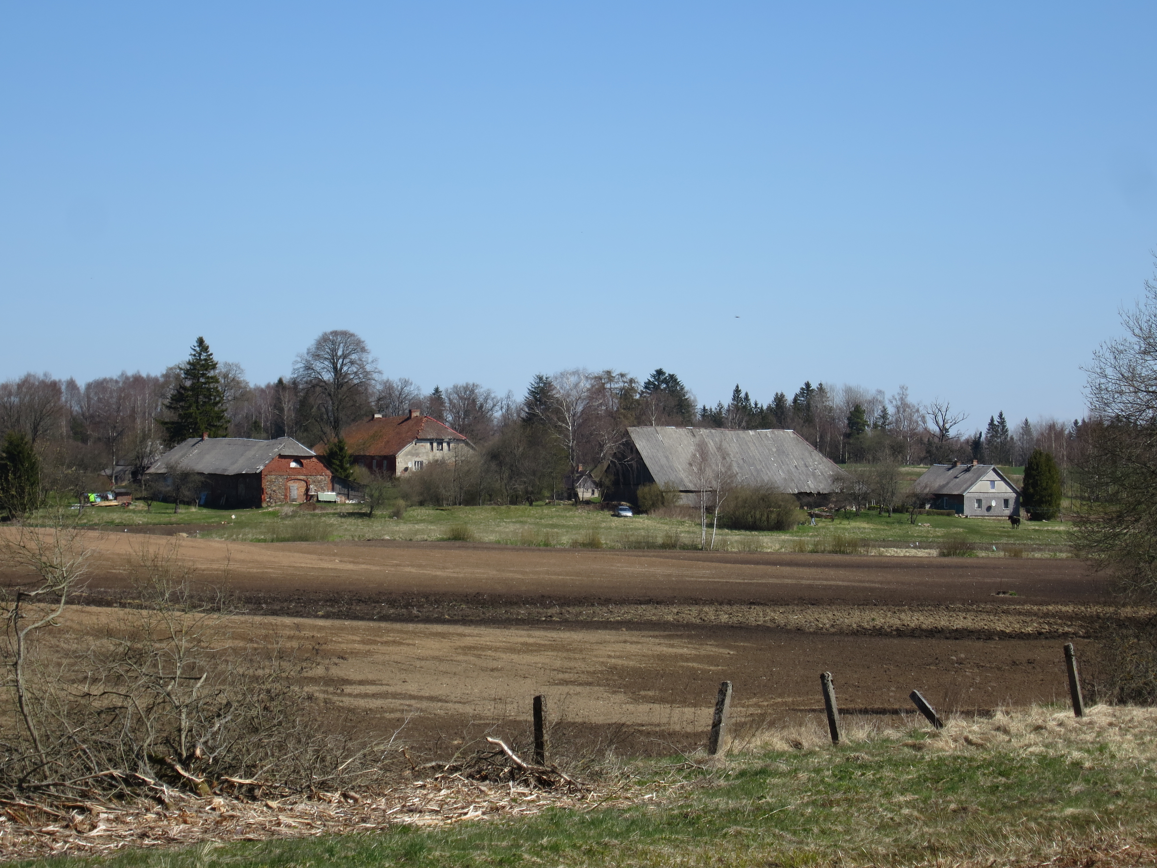 Kandeļu ciems, skatoties no dzelzceļa Jelgava—Liepāja